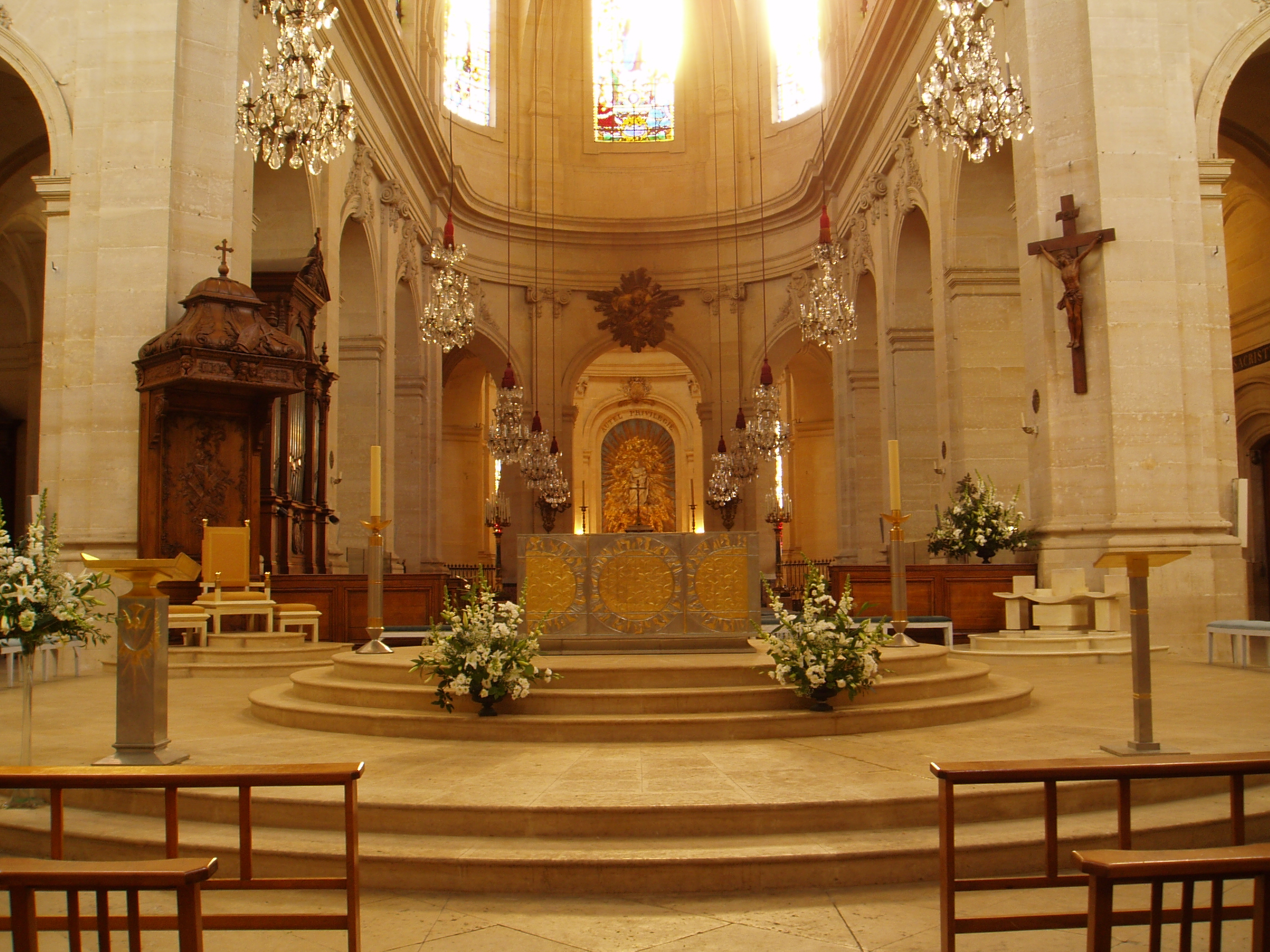 Cathédrale Saint Louis de Versailles Architecte : Jules Hardouin Mansart de Sagonne Construction : 12 juin 1743 Inauguration : 24 août 1754 consacrée cathédrale en 1843